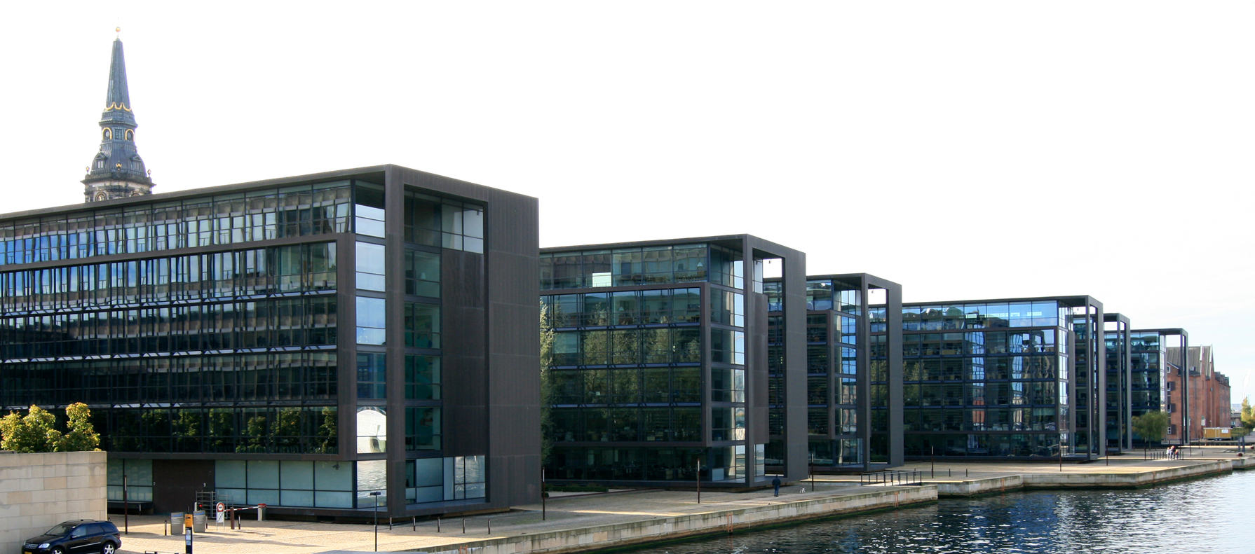 Nordeas domicil, Christianshavn, København. Bygget 1999. Arkitekter: Henning Larsens Tegnestue.